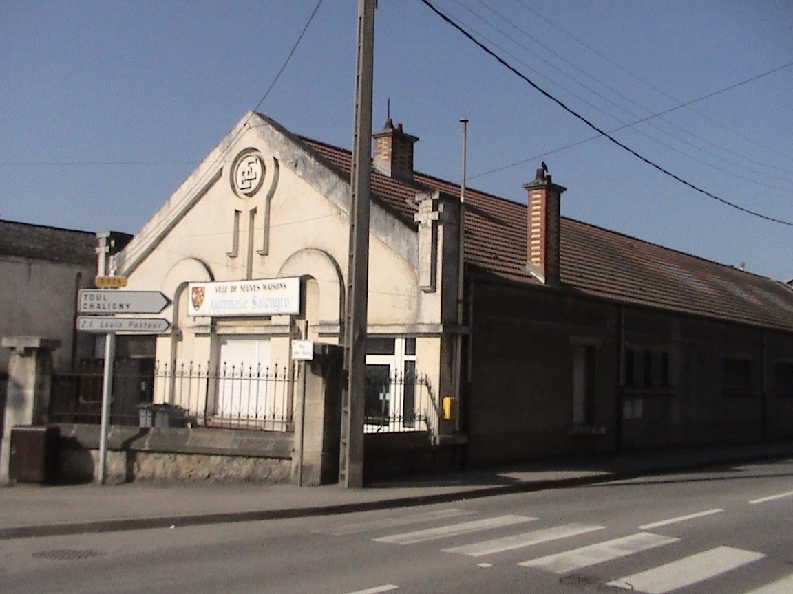 Chemiserie Ernest Ewald Neuves Maisons - Gymnase Samengro